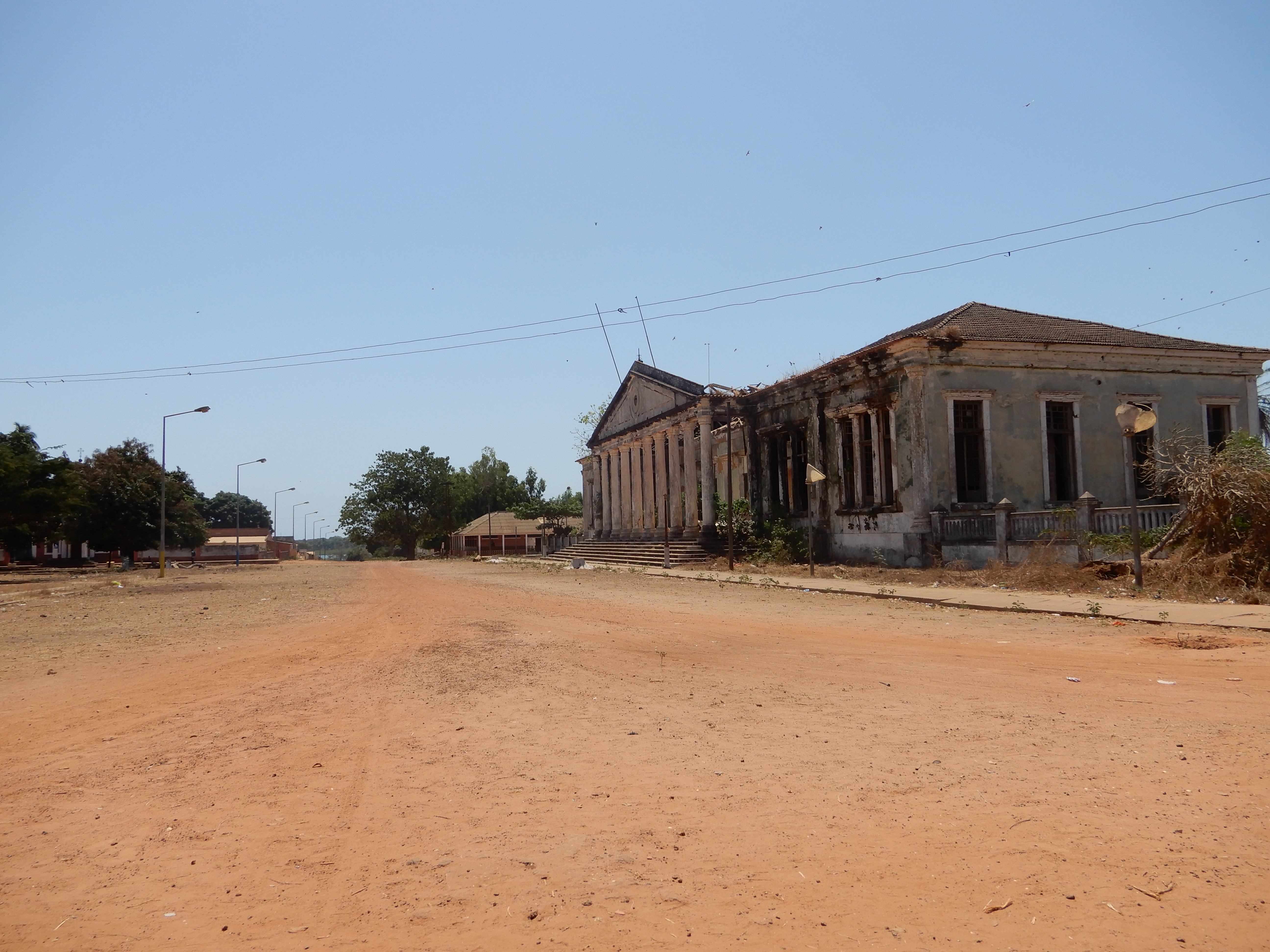 Paços do Concelho, Bolama, Guiné-Bissau